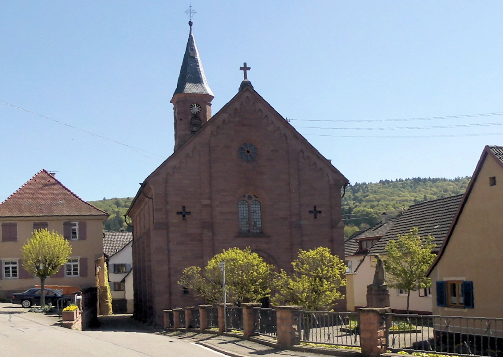 Markuskirche in Schmieheim, Gemeinde Kippenheim, Ortenaukreis, Baden-Württemberg